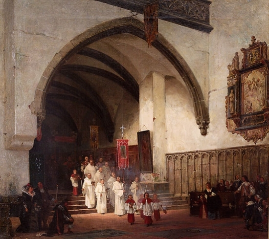 Katolsk prosesjon i kirkeinteriør.